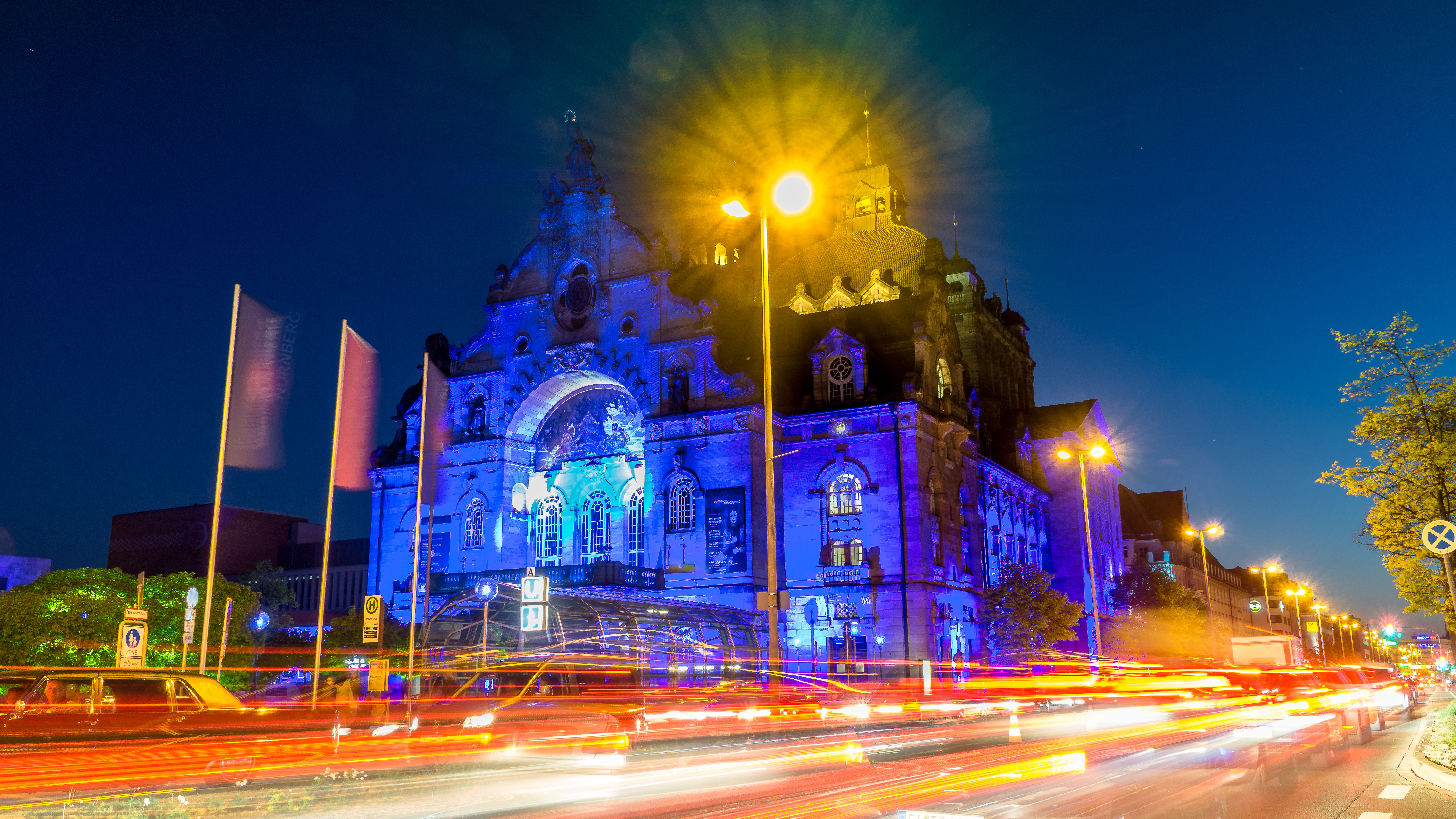 Während der blauen Nacht in Nürnberg im Jahr 2016